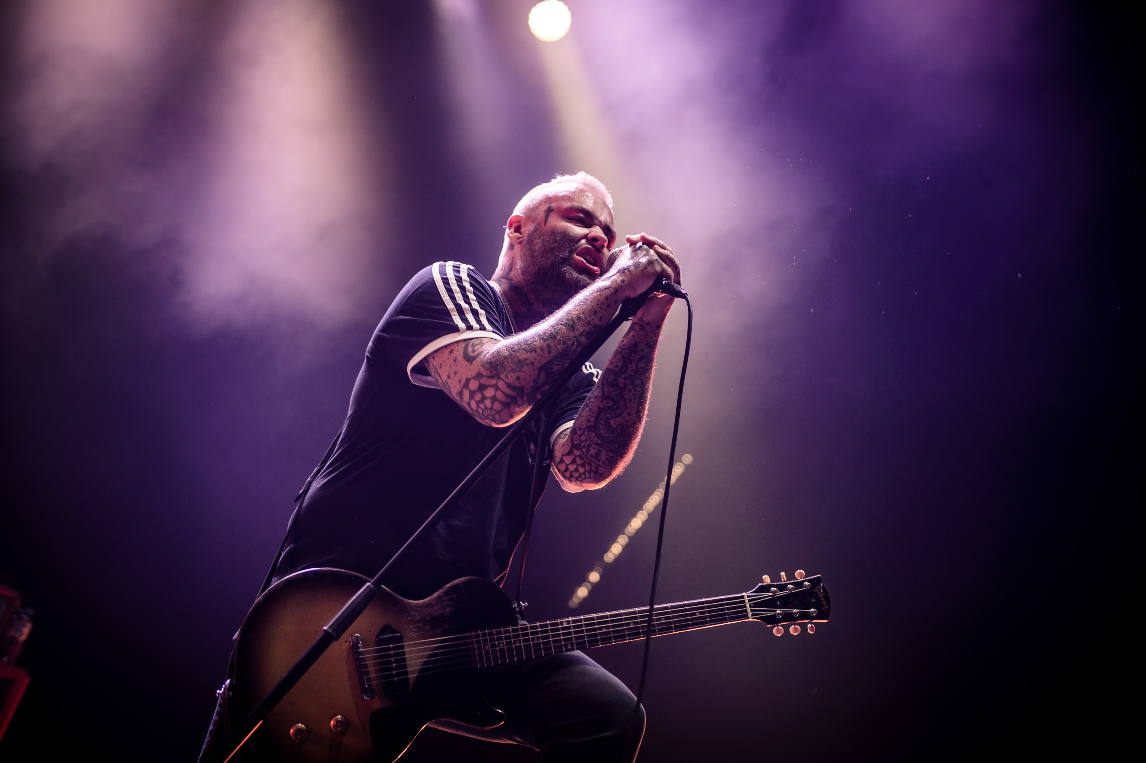 'Rock im Park 2018; Zeppelinfeld Nürnberg': 'Alexisonfire'